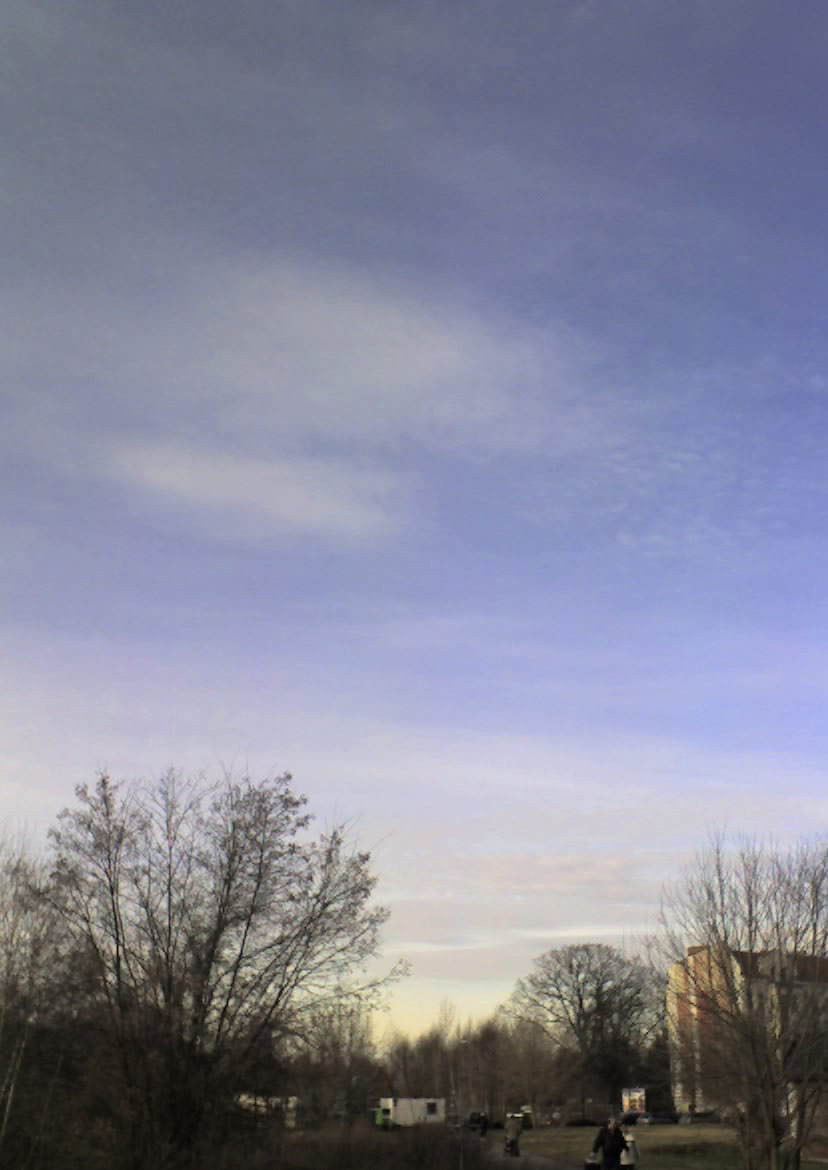 Die Farbe eines klaren Wintertages unter 52°Nord, fast am Mittag Blau